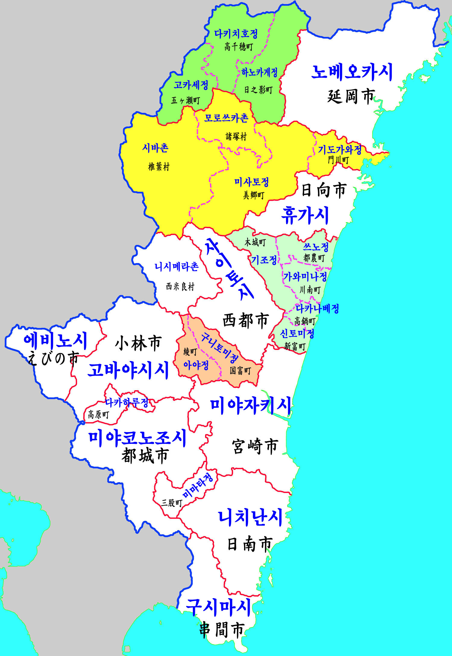 미야자키현 행정구역